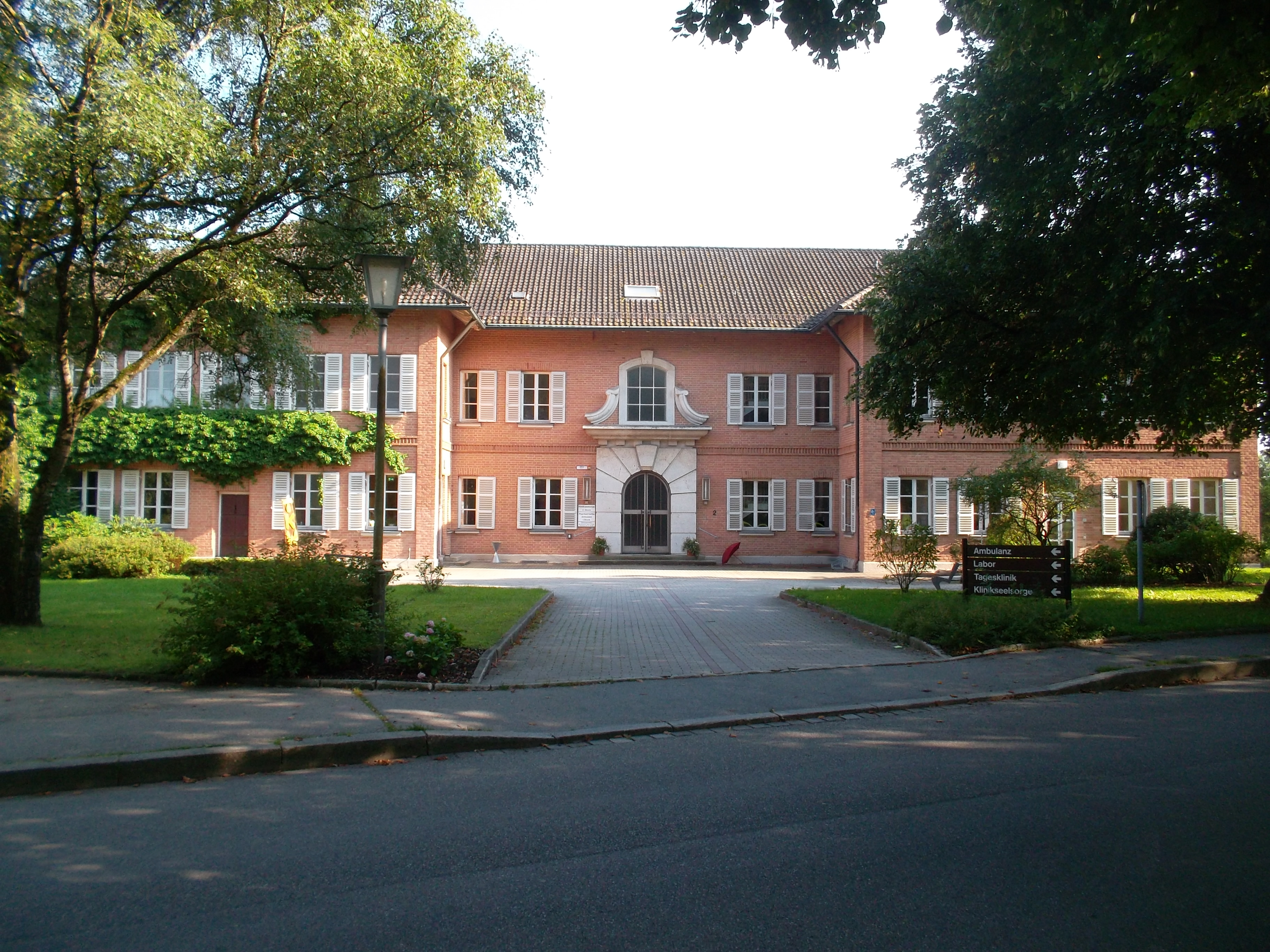 Wasserburg a Inn, Gabersee, Verwaltungsgebäude des Inn-Salzach-Klinikums